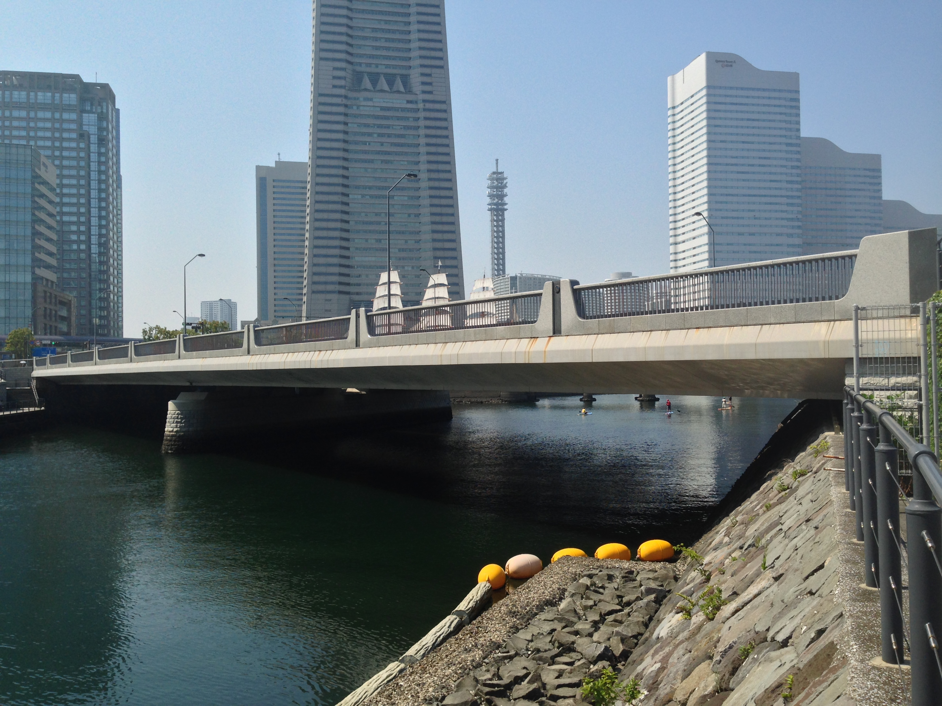 大岡川に架かる北仲橋。